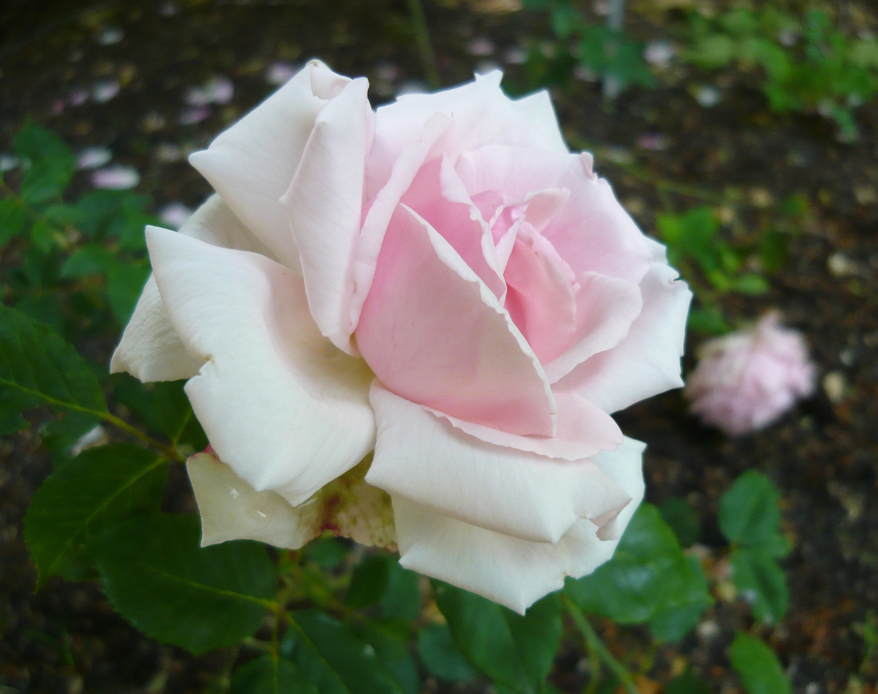 Rosa 'Blairi No. 1'. Real Jardín Botánico de Madrid